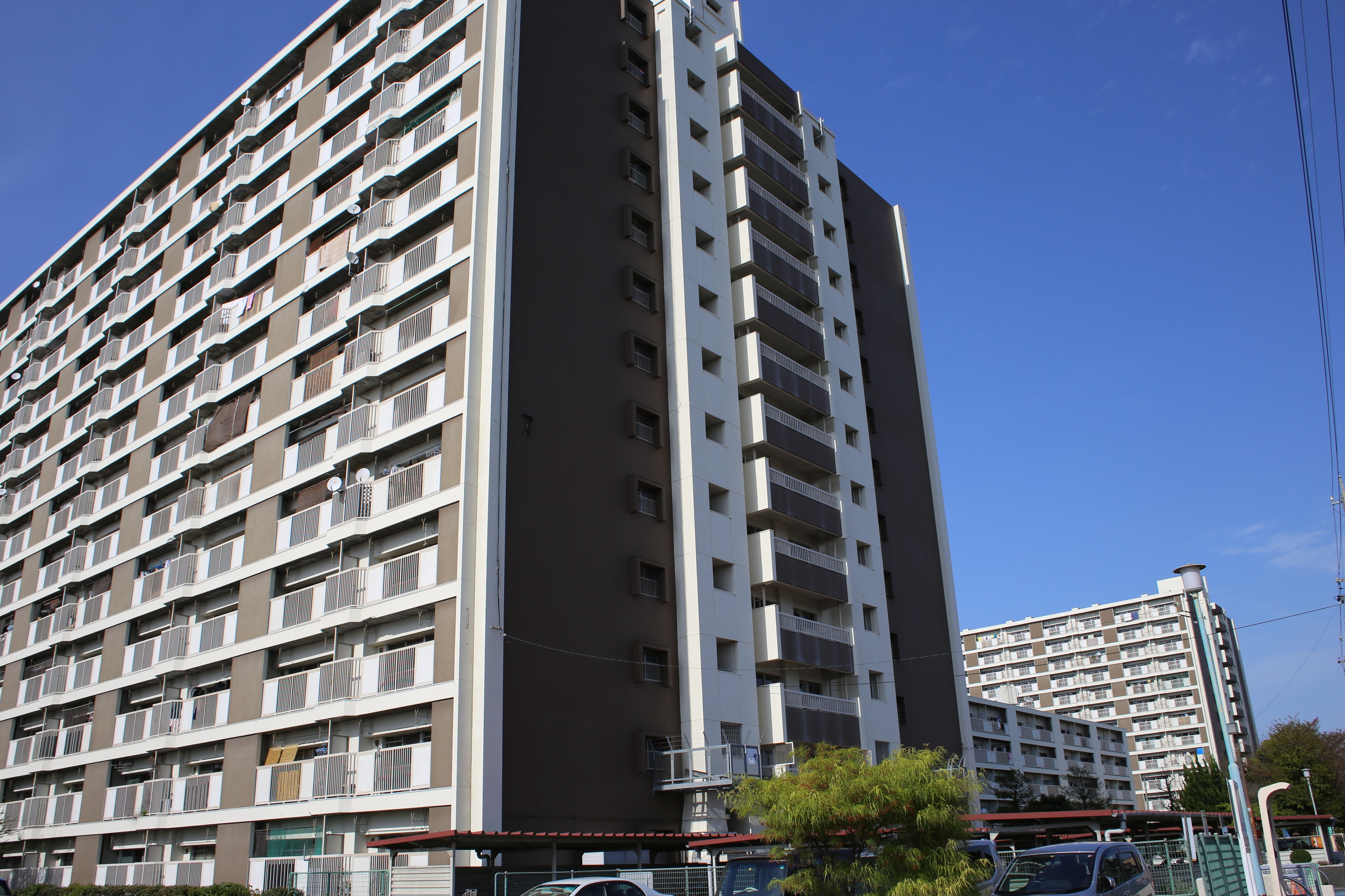 名古屋市南区氷室町の名古屋市営氷室荘